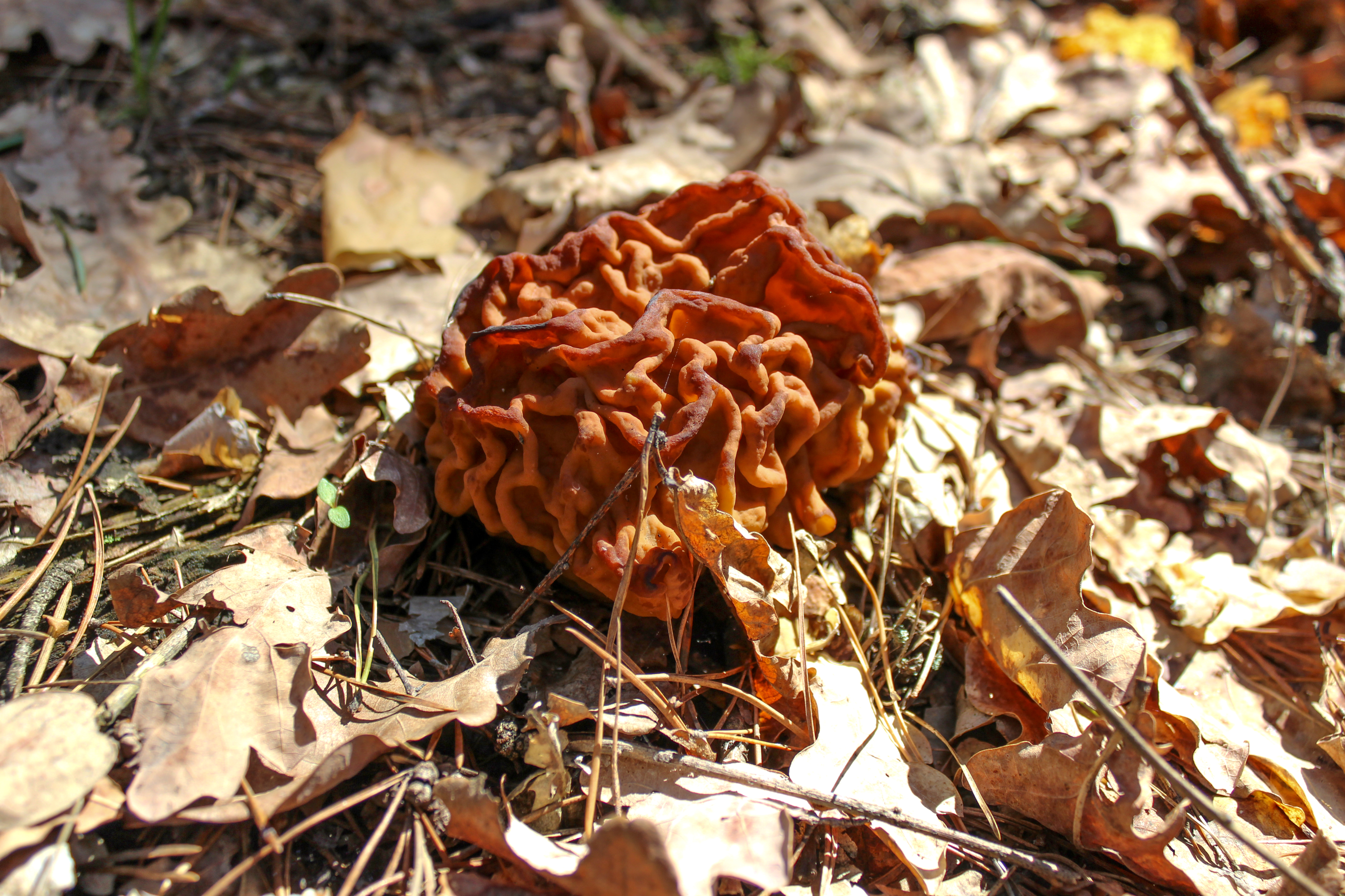 Катюжанський, Вишгородський район, Катюжанська сільська рада